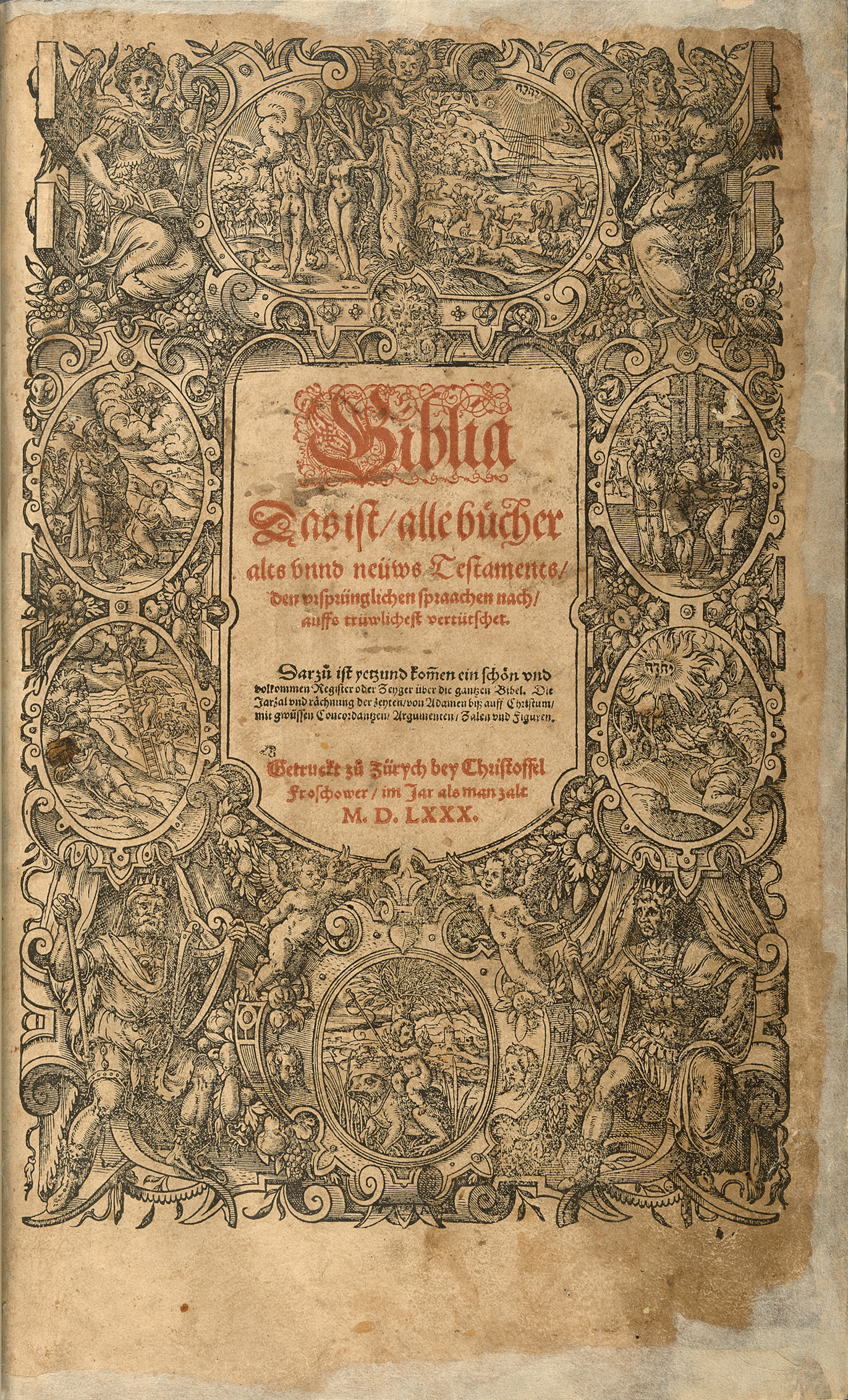 Titelblatt der Froschauer Bibel von 1580 Gutenberg Museum Place de Notre Dame 14 1700 Fribourg Switzerland